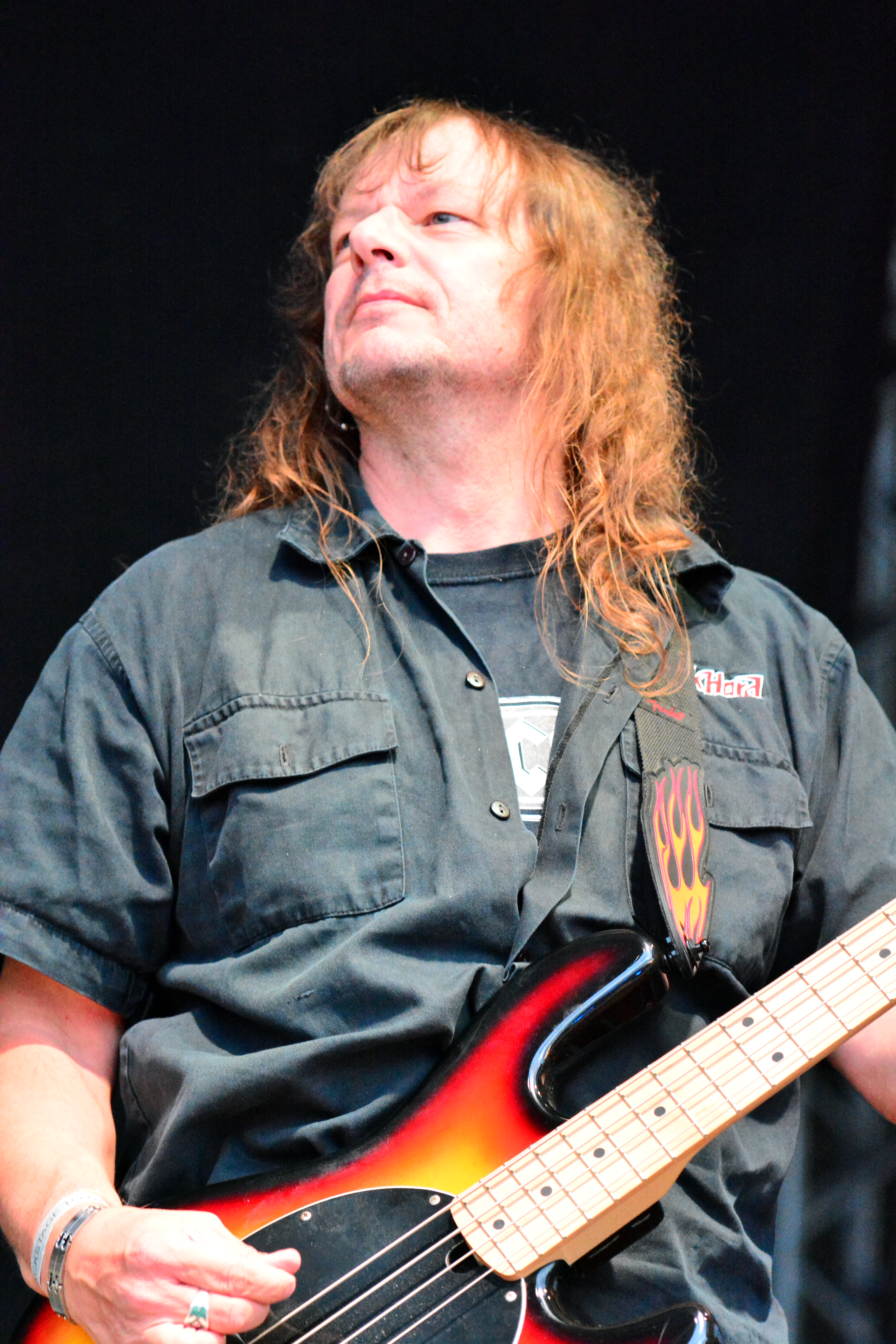 Jens Becker von Grave Digger, Running Wild und Bon Scott beim Tower-Festival 2014